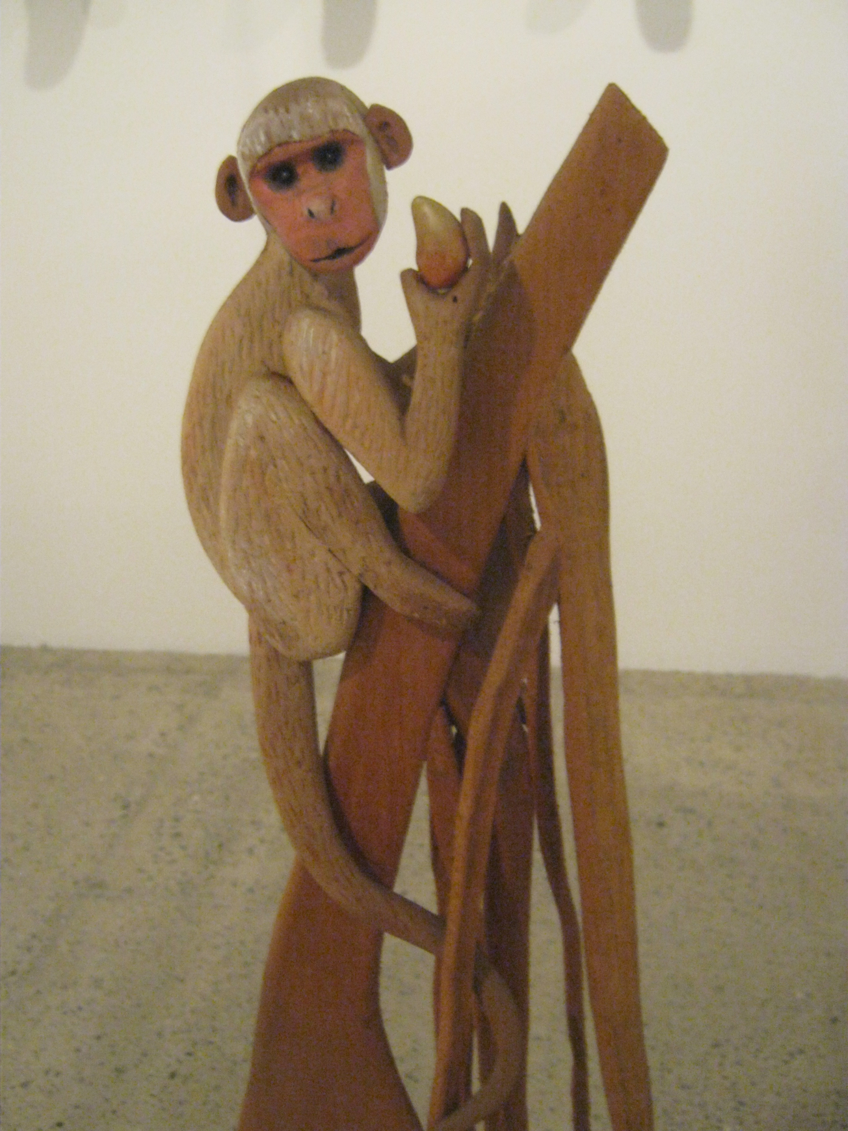 Obra expuesta en el tercer piso de La Tertulia, denominada el arte como experiencia